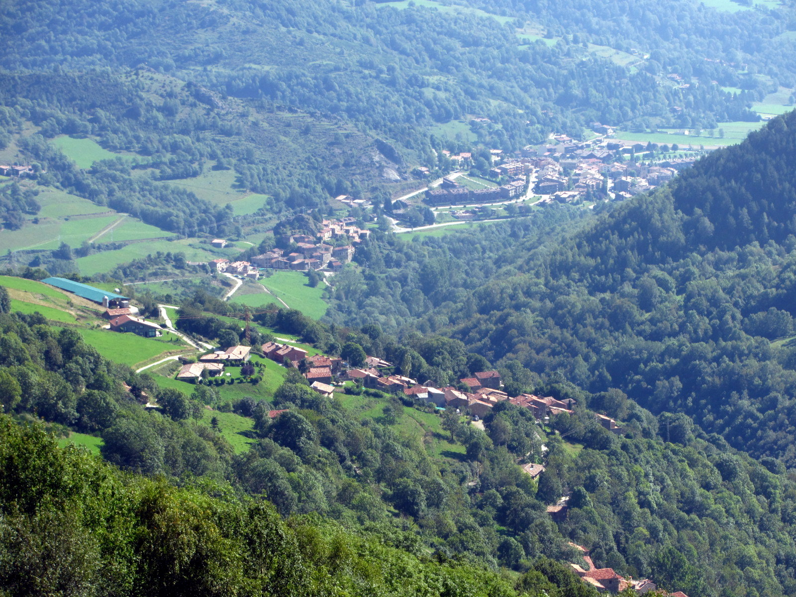 El poble d'Abella, i al fons La Roca i Llanars